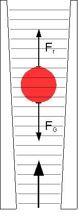 Skizze zum Funktionsprinzip eines Rotameters Zu sehen ist die Skizze einer Frontansicht eines Rotameters. Es besteht aus einer sich nach oben erweiternden Glasröhre mit einem Schwebekörper darin. Dieser Aufbau dient zum Messen der Flussrate eines Gases oder einer Flüssigkeit, die das Rotameter von unten nach oben durchströmen. Die Höhe des Schwebekörpers bestimmt dabei die Flussrate.